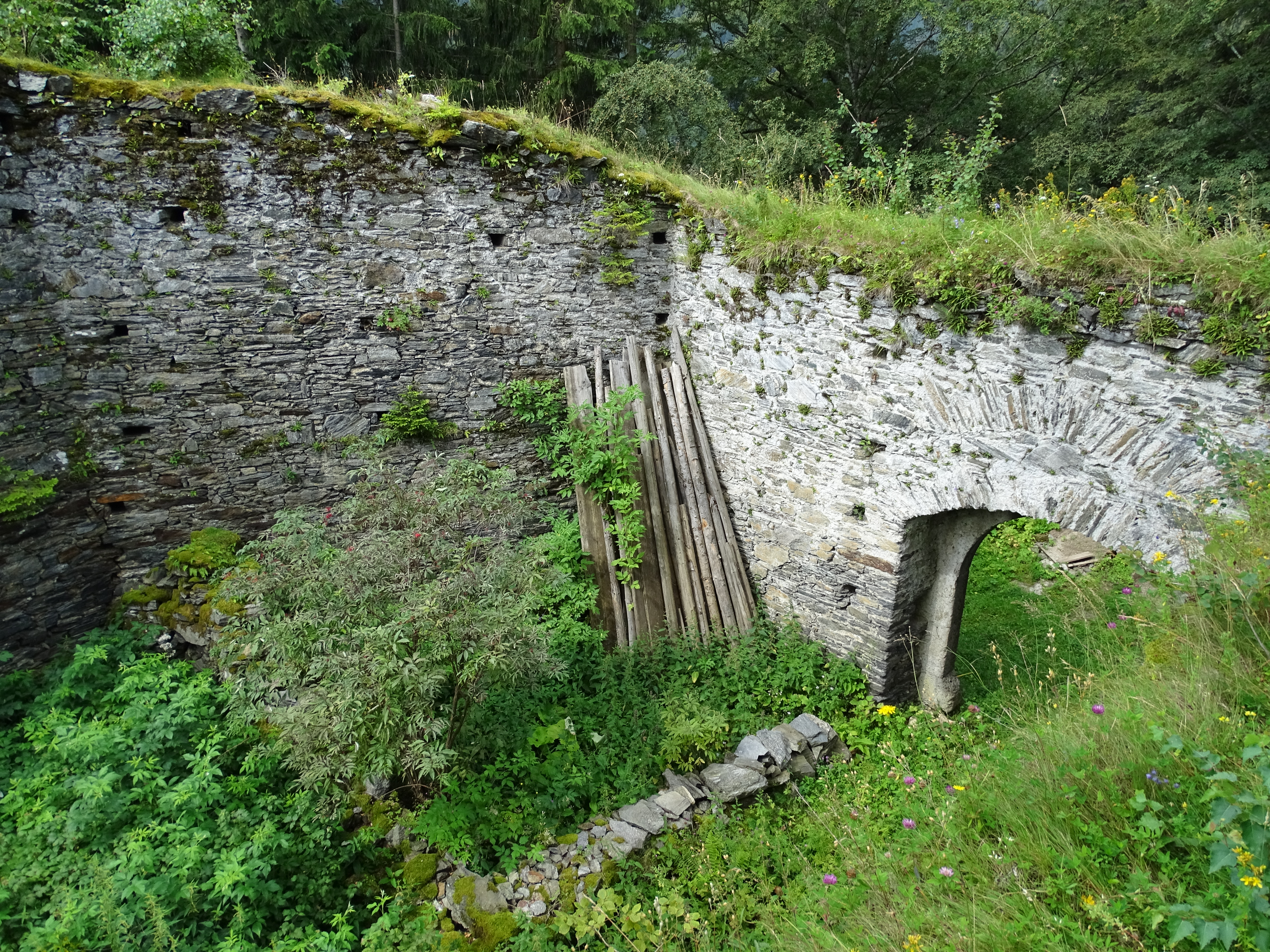 Blick vom oberen auf den unteren Burghof der Burg Hauenstein bei Gallmannsegg in der Gemeinde Kainach bei Voitsberg